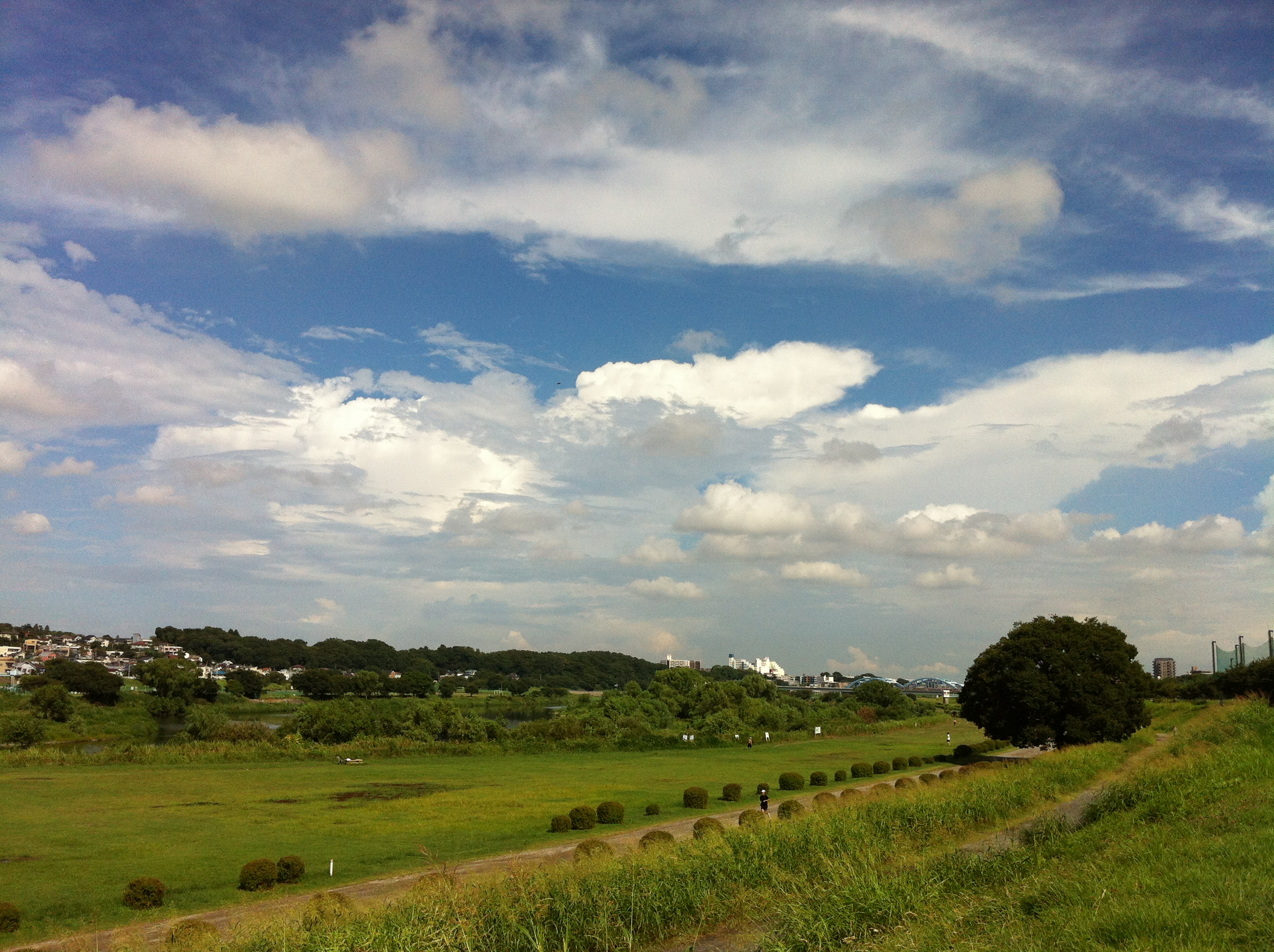 Todoroki, Nakahara Ward, Kawasaki, Kanagawa Prefecture 211-0052, Japan